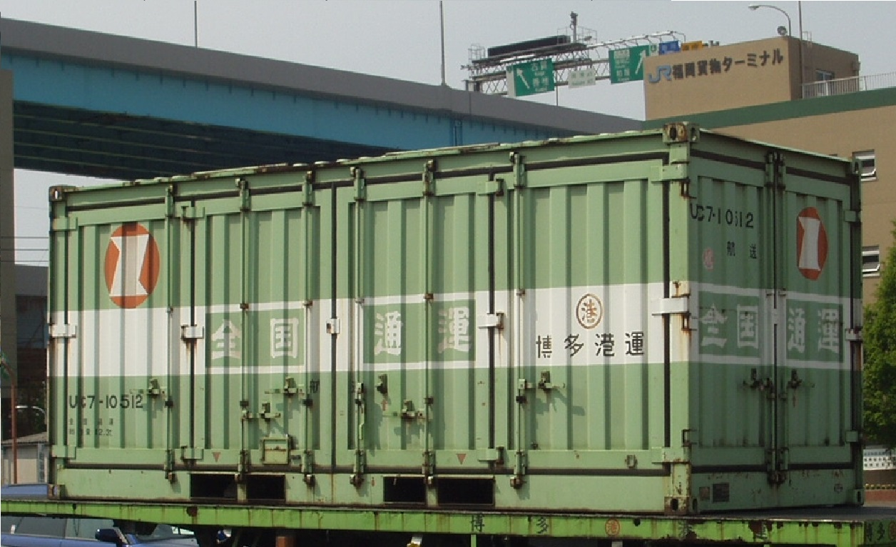 【福岡(タ)】